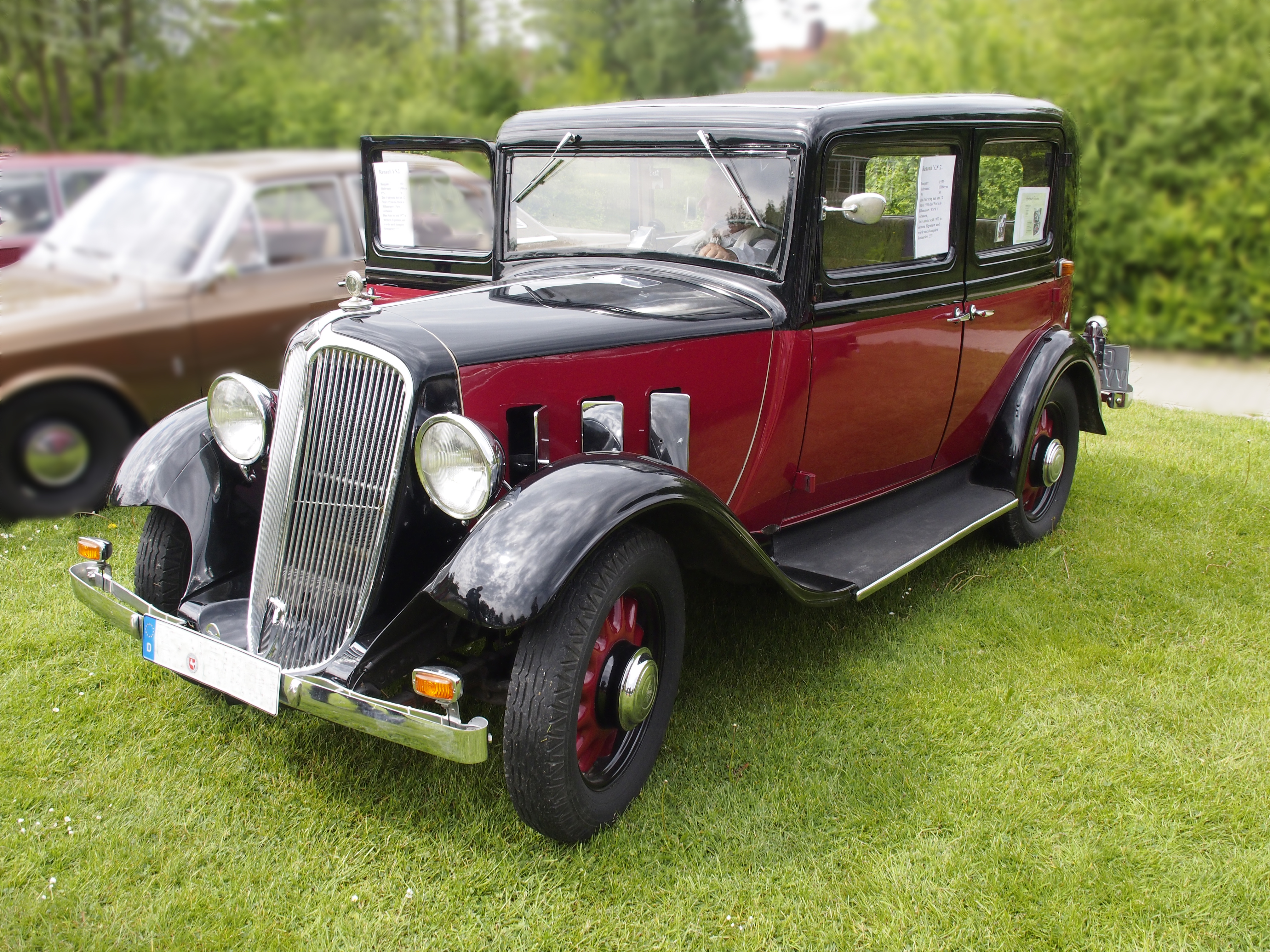 Renault Monaquatre YN 2, Baujahr 1933, 1500 ccm, 30 PS